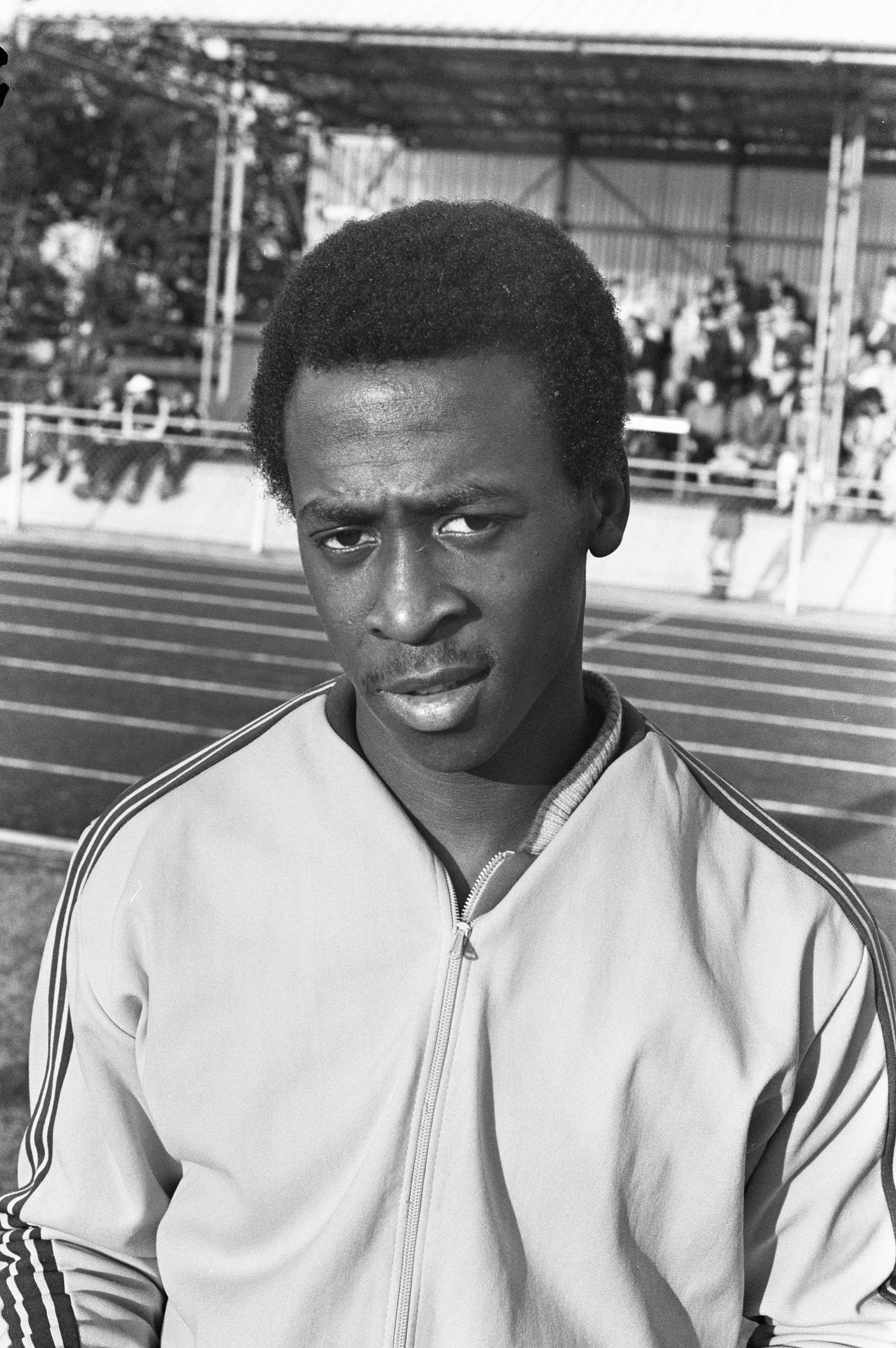 Collectie / Archief : Fotocollectie Anefo Reportage / Serie : [ onbekend ] Beschrijving : Atletiek-interland Nederland tegen Ierland te Drachten, nummer 5 Sammy Monsels , nummer 6 B. de Jager , nummer J. Struyk , nummer 8 W. Braaksma (allen Datum : 12 juli 1972 Locatie : Drachten Trefwoorden : atletiek Persoonsnaam : B. de Jager, J. Struyk, W. Braaksma Fotograaf : Verhoeff, Bert / Anefo Auteursrechthebbende : Nationaal Archief Materiaalsoort : Negatief (zwart/wit) Nummer archiefinventaris : bekijk toegang 2.24.01.05 Bestanddeelnummer : 925-7342